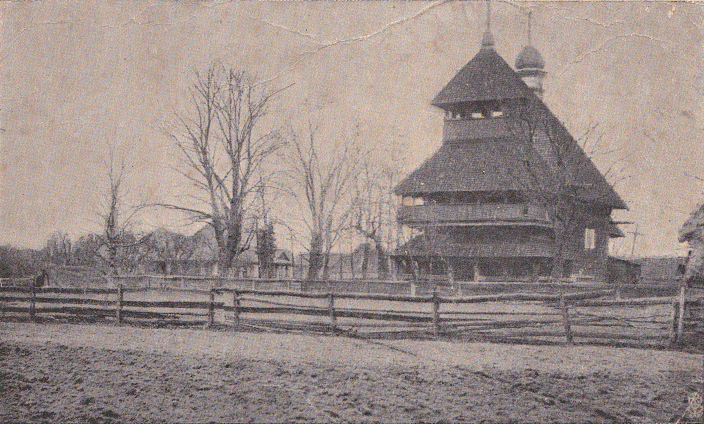 Беларуская (тарашкевіца): Дакудаў (Dakudaŭ). Царква Сьвятой Параскевы Пятніцы